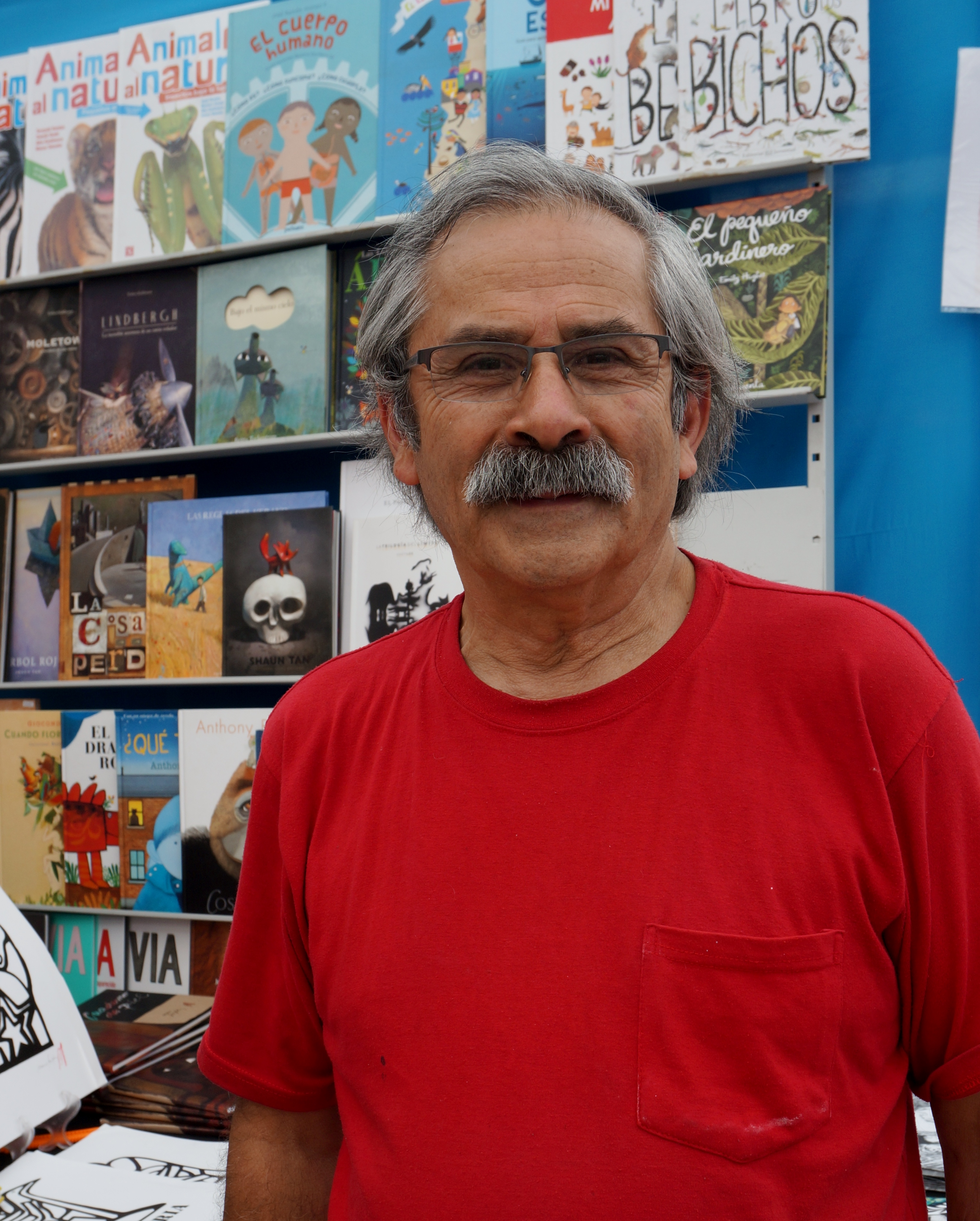 El muralista Mono González en la Feria Internacional del Libro de Santiago 2017.